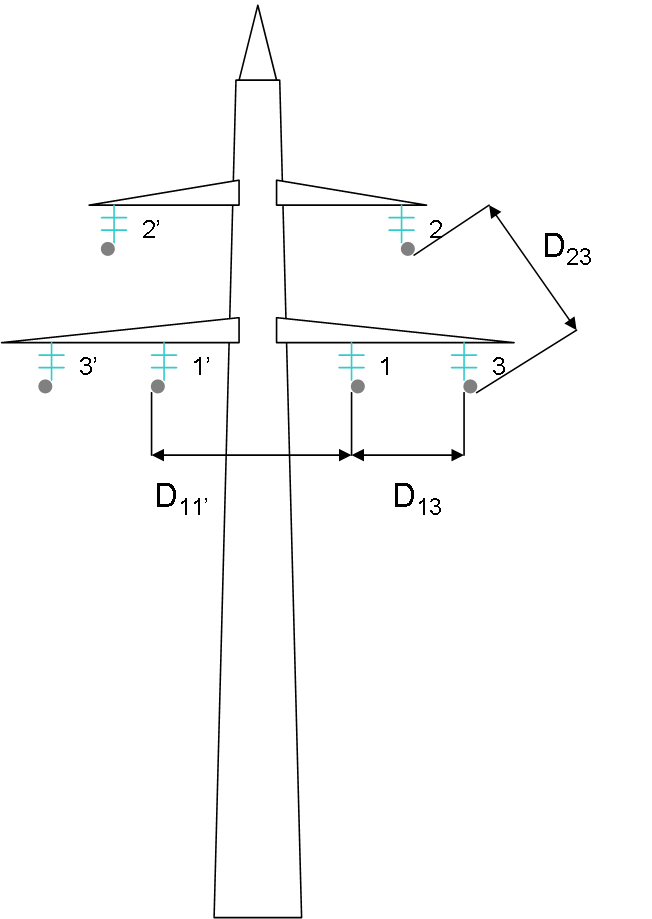 Description des distances entre conducteurs ou faisceaux de conducteur sur un poteau électrique